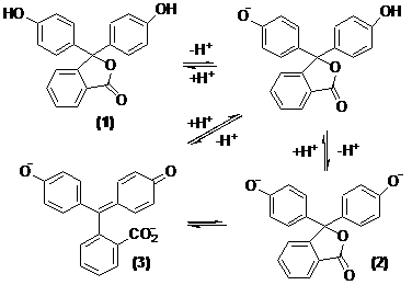 Ionizačné reakcie fenolftaleínu